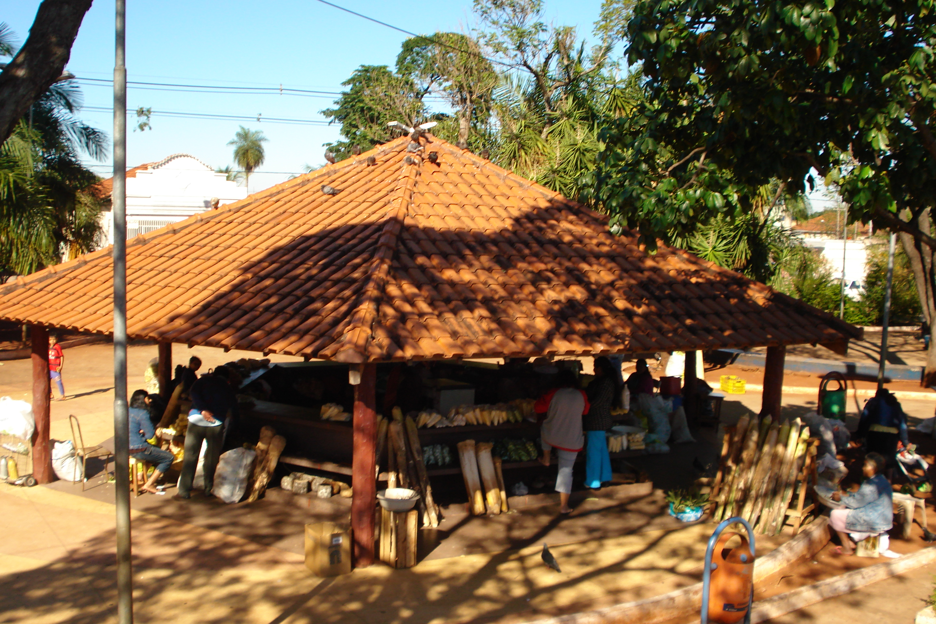 Indigenous Feira